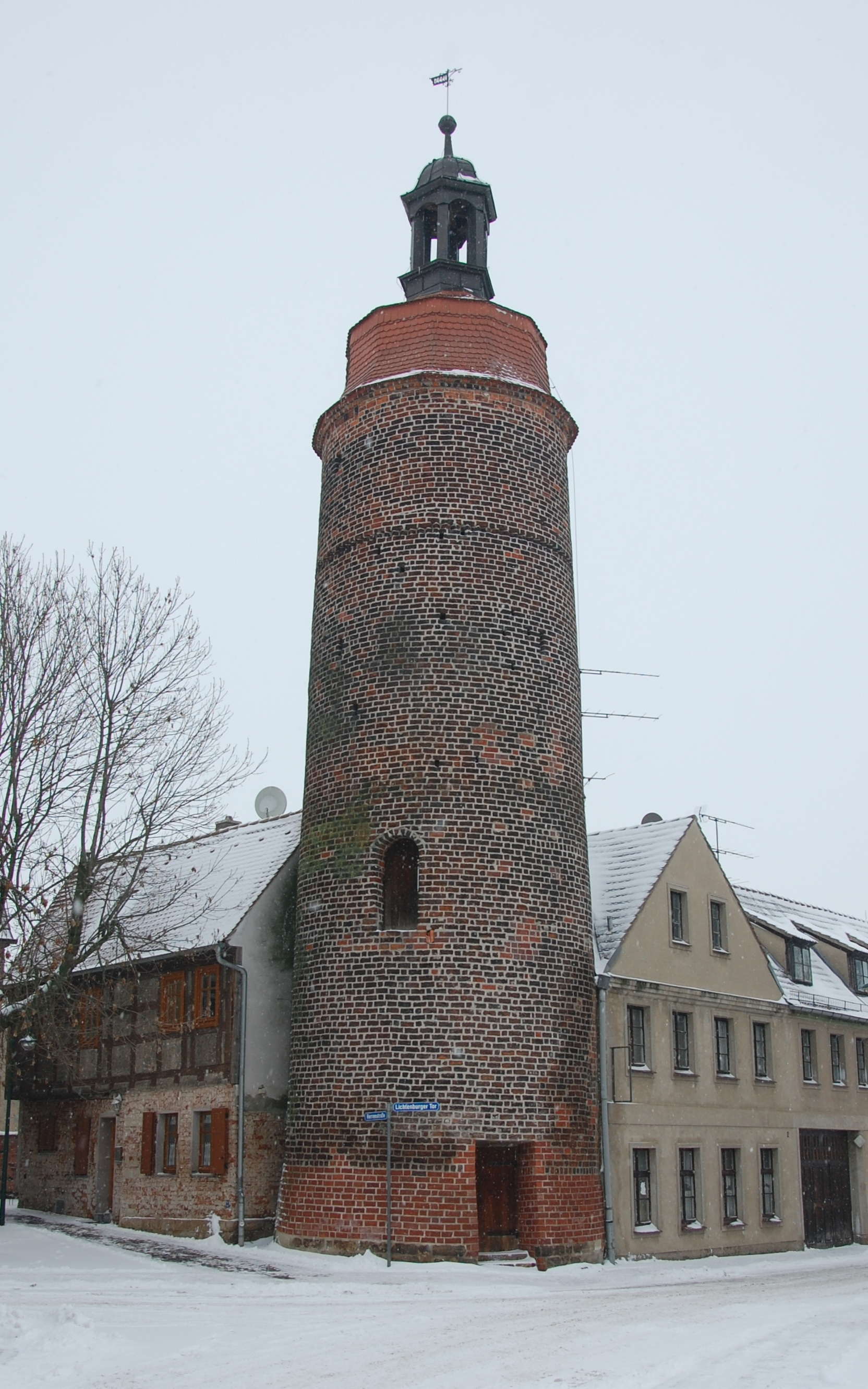 Lichtenburger Torturm